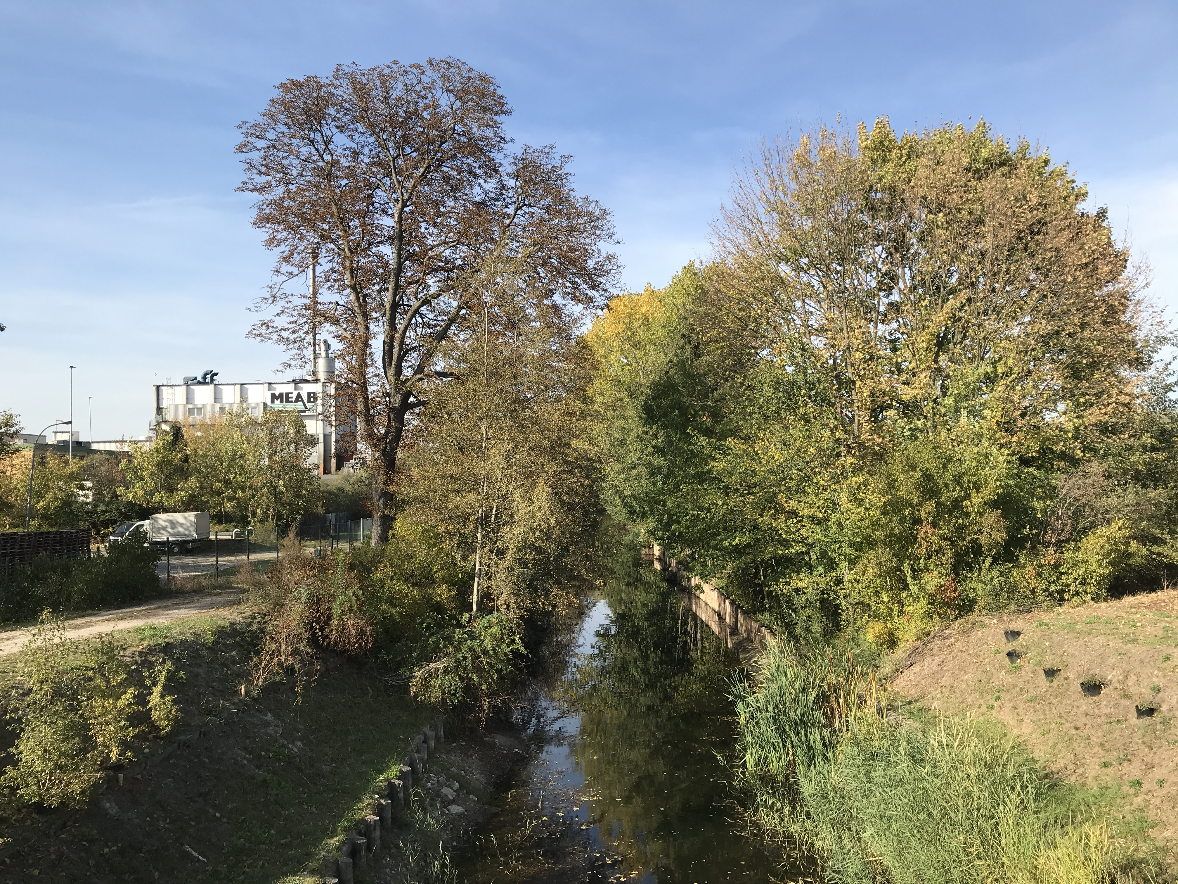 Galluner Kanal, Wasserstraße in Brandenburg